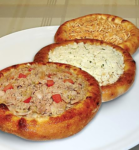 FOTO SFIHA ABERTA - CARNE, QUEIJO E FRANGO